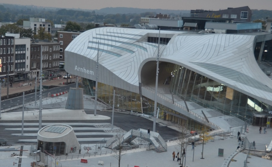 Station Arnhem centraal vanuit de Pathé Bioscoop